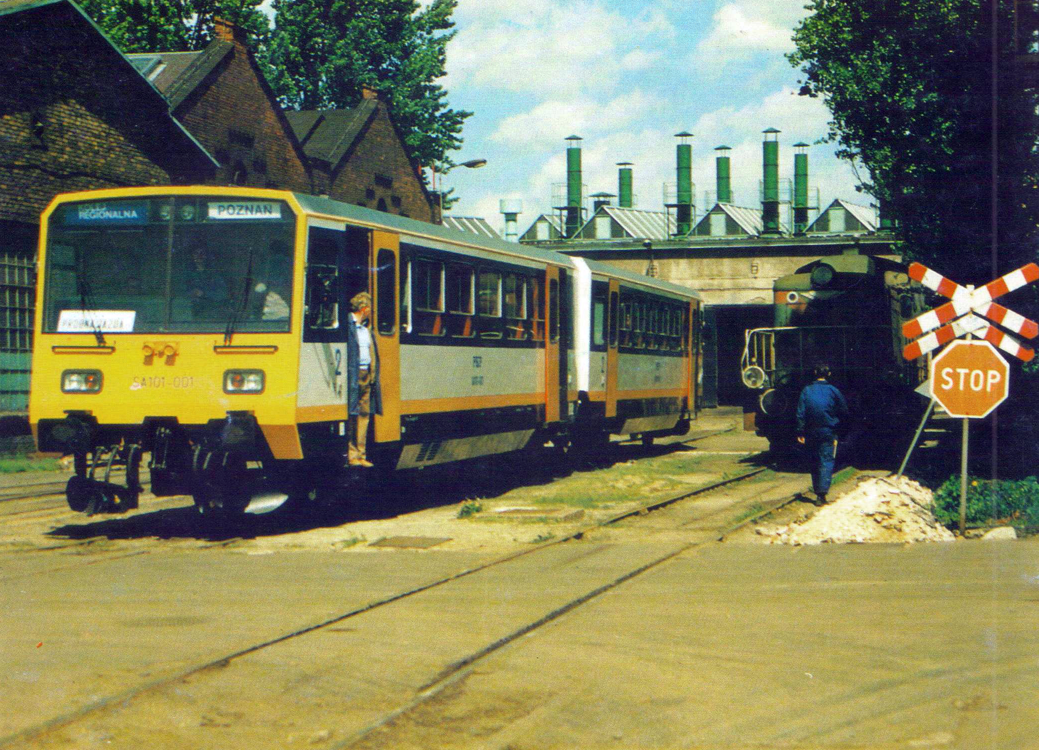 Autobus szynowy SA101-001+SA121-001 przygotowywany do jazdy próbnej na terenie ZNTK Poznań.